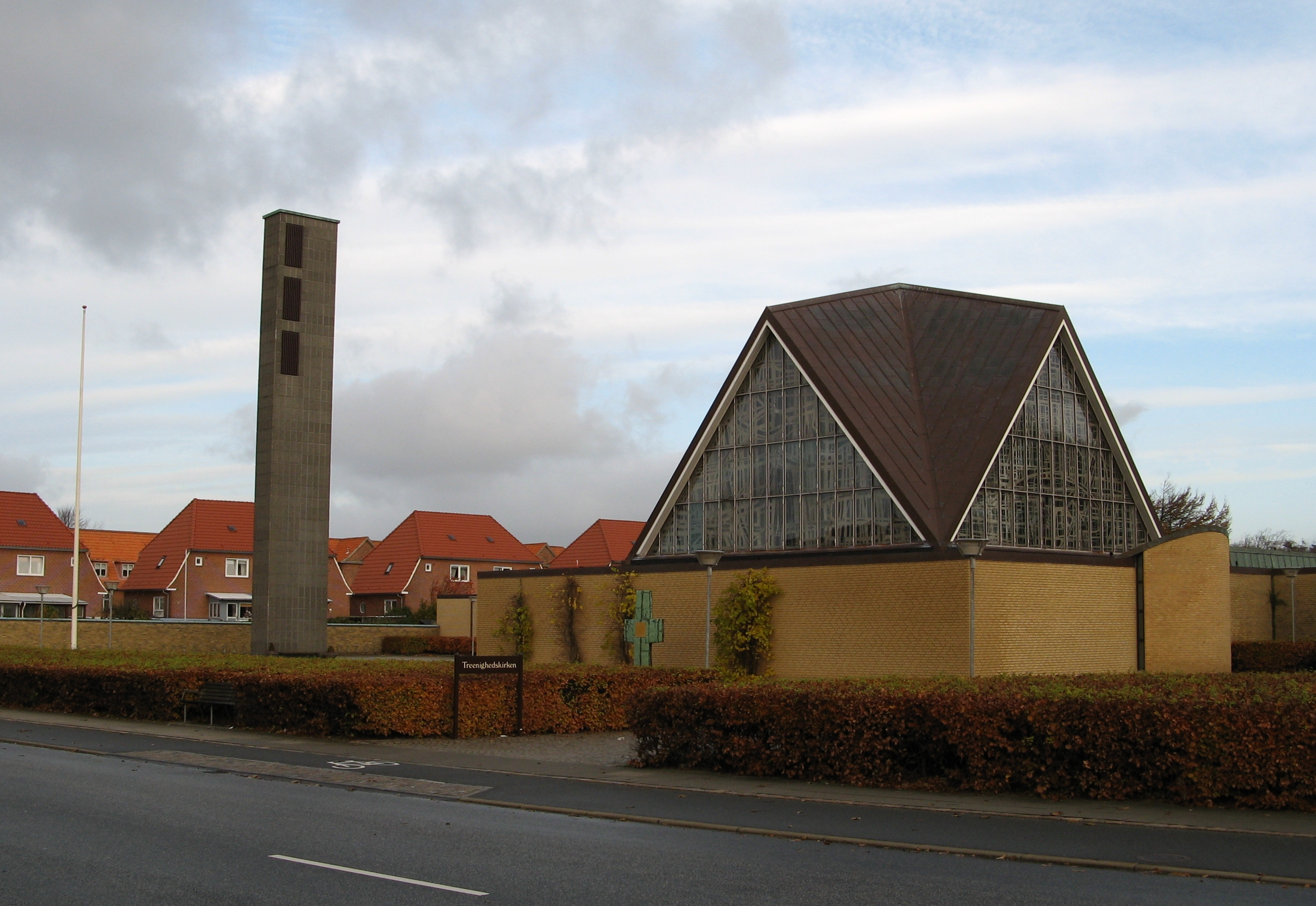 Treenighedsskirken, Treenigheds sogn, Esbjerg kommune (former: Skads Herred, Ribe Amt). Kirken set fra sydøst